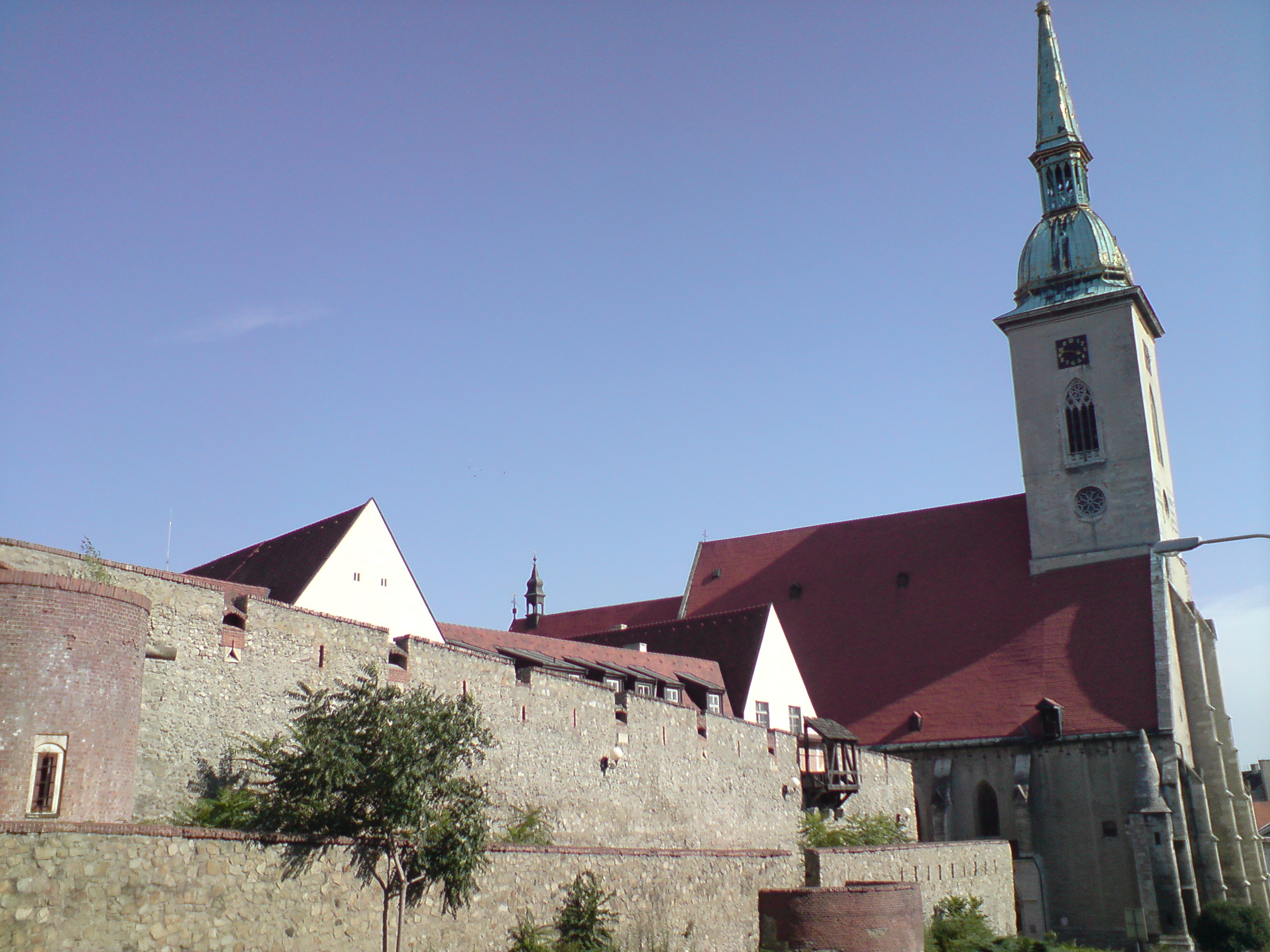 Katedrála sv. Martina, Bratislava